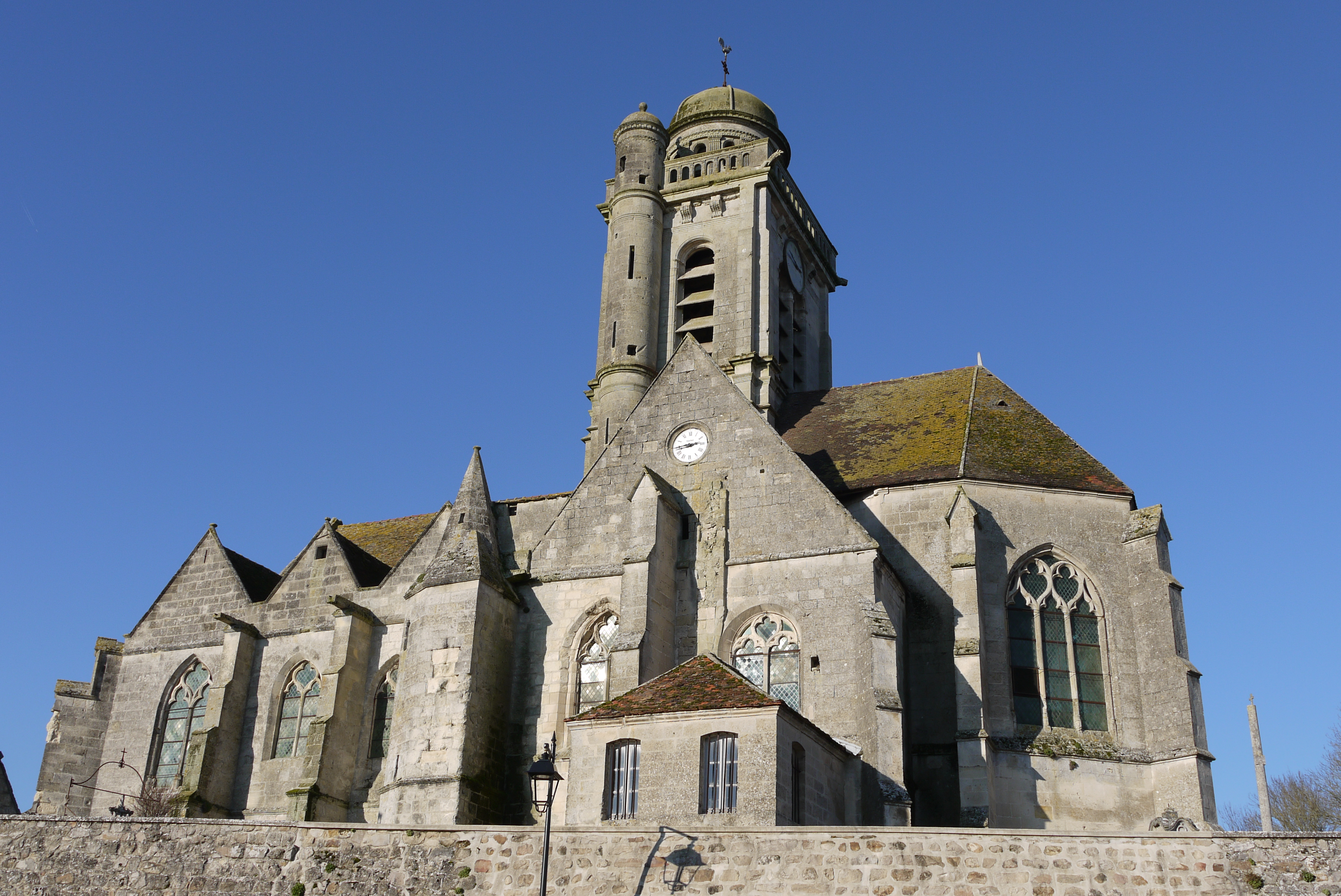 Église Saint-Rémi de Saint-Rémy-Blanzy